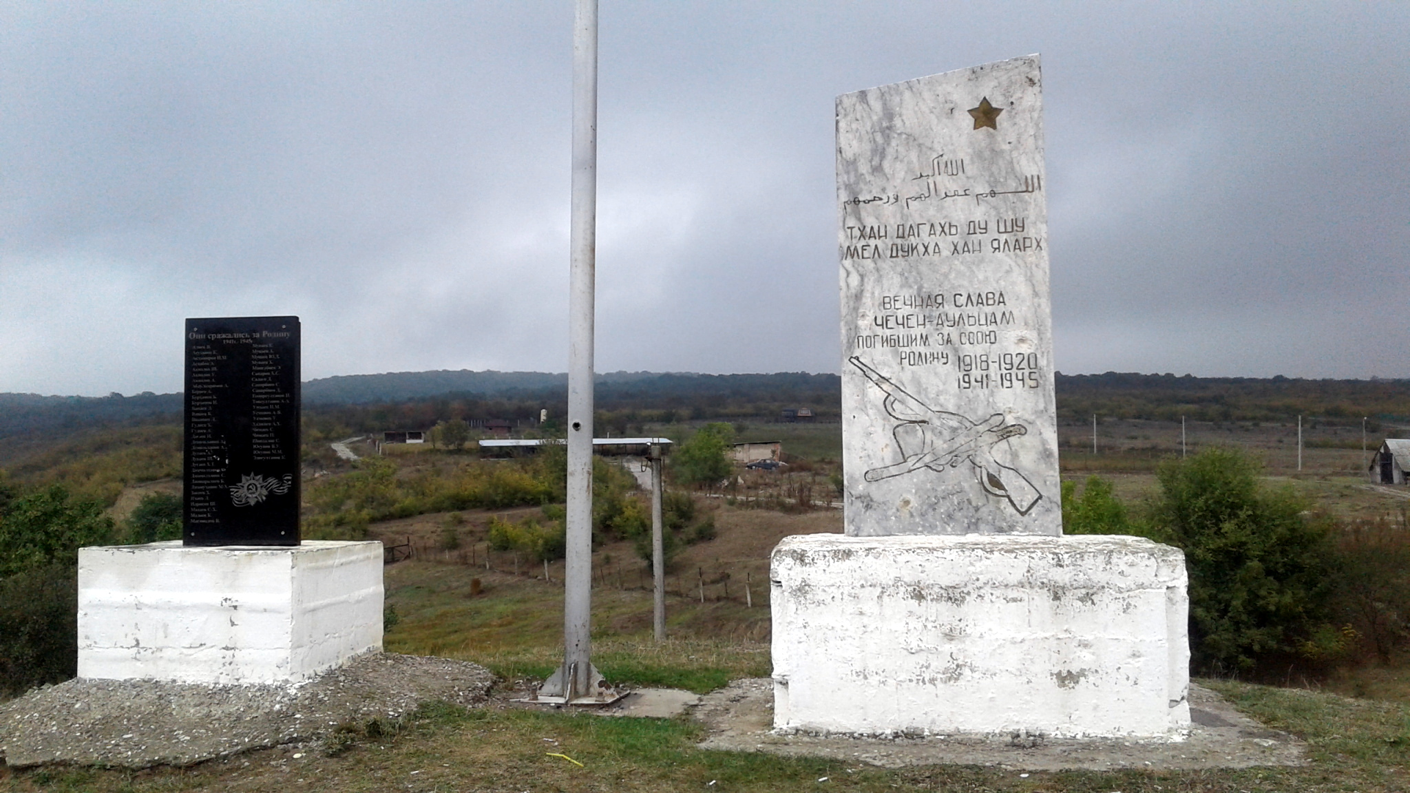 Памятник уроженцам Чечен-Аула, павшим в годы Великой Отечественной войны